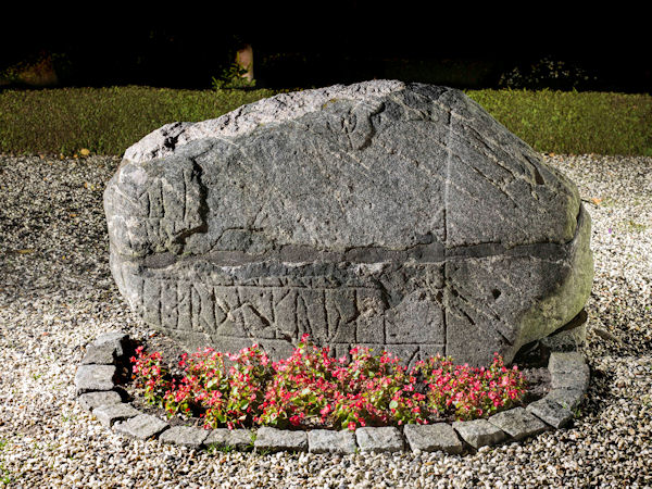 Foto af Roberto Fortuna 2012